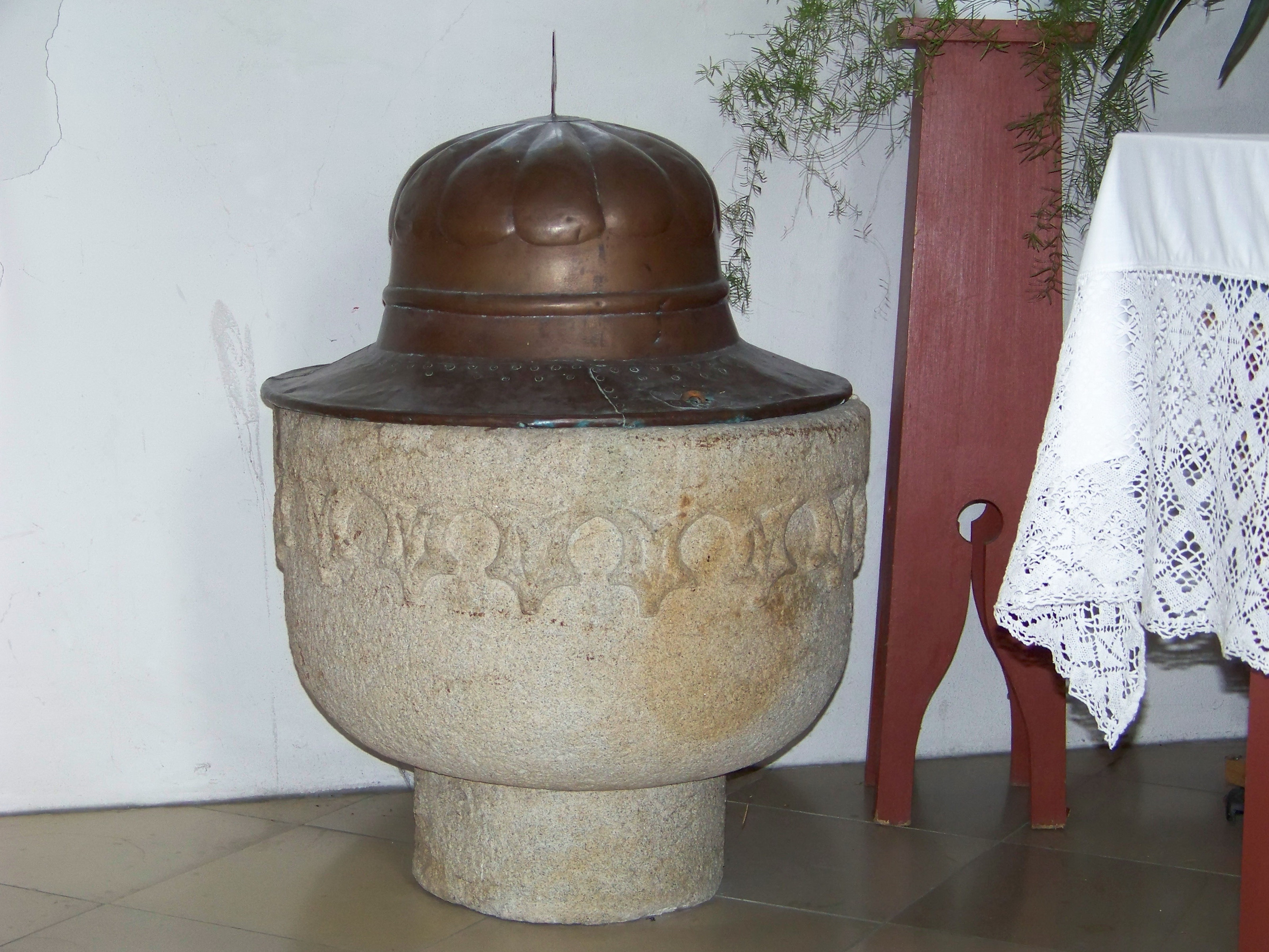 Landau an der Isar. Niederhöcking, Dingolfinger Straße 33. Pfarrkirche St. Martin. Der gotische Taufstein stammt aus dem 14. Jahrhundert. Ständer und Becken sind rund. Den Beckenrand umzieht ein breites Maßwerkfries.